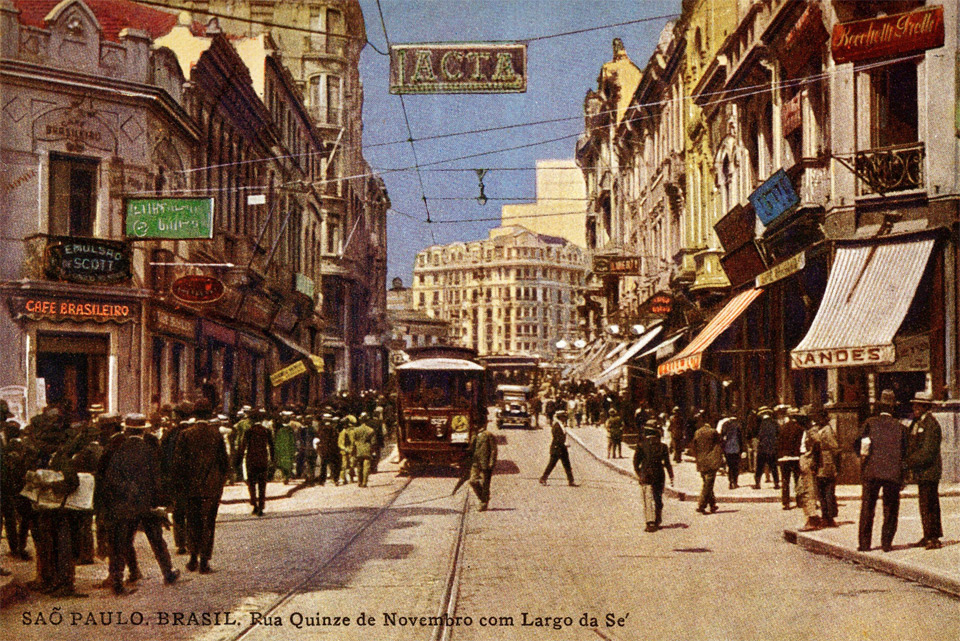 Historia Lacta - 1926